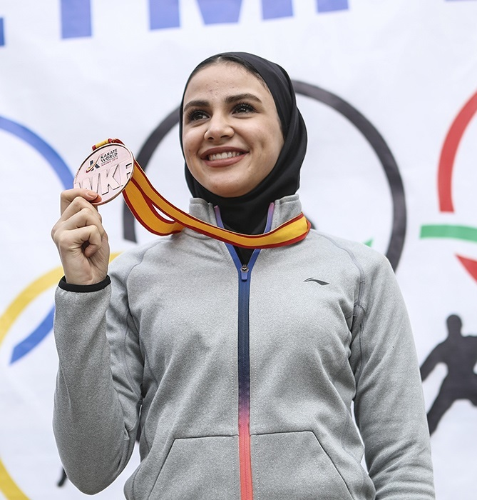 مراسم استقبال از سارا بهمنیار در مجموعه شهید عضدی رشت